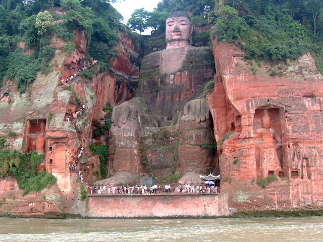 ELÍAS CABABIE DANIEL FOTO DEL GRAN BUDA DE LESHAN